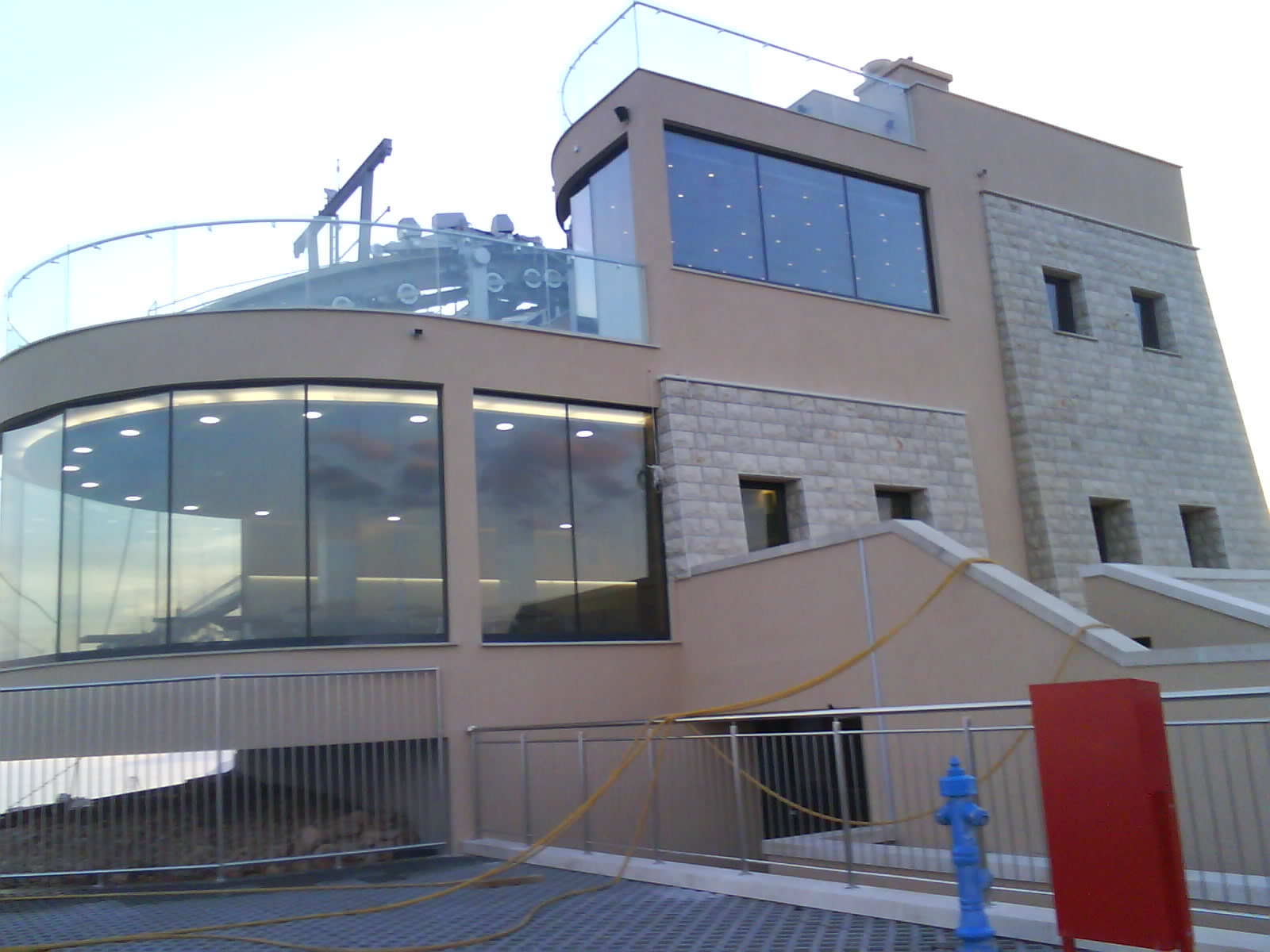 Žičara prije puštanja u promet